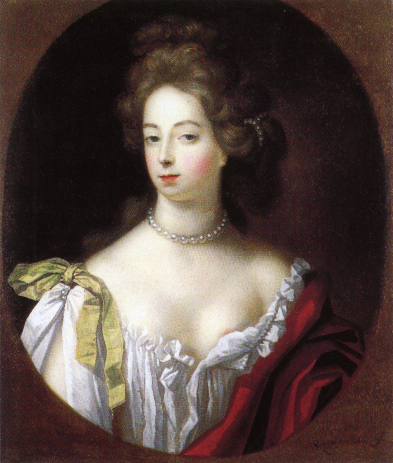 Nell Gwyn